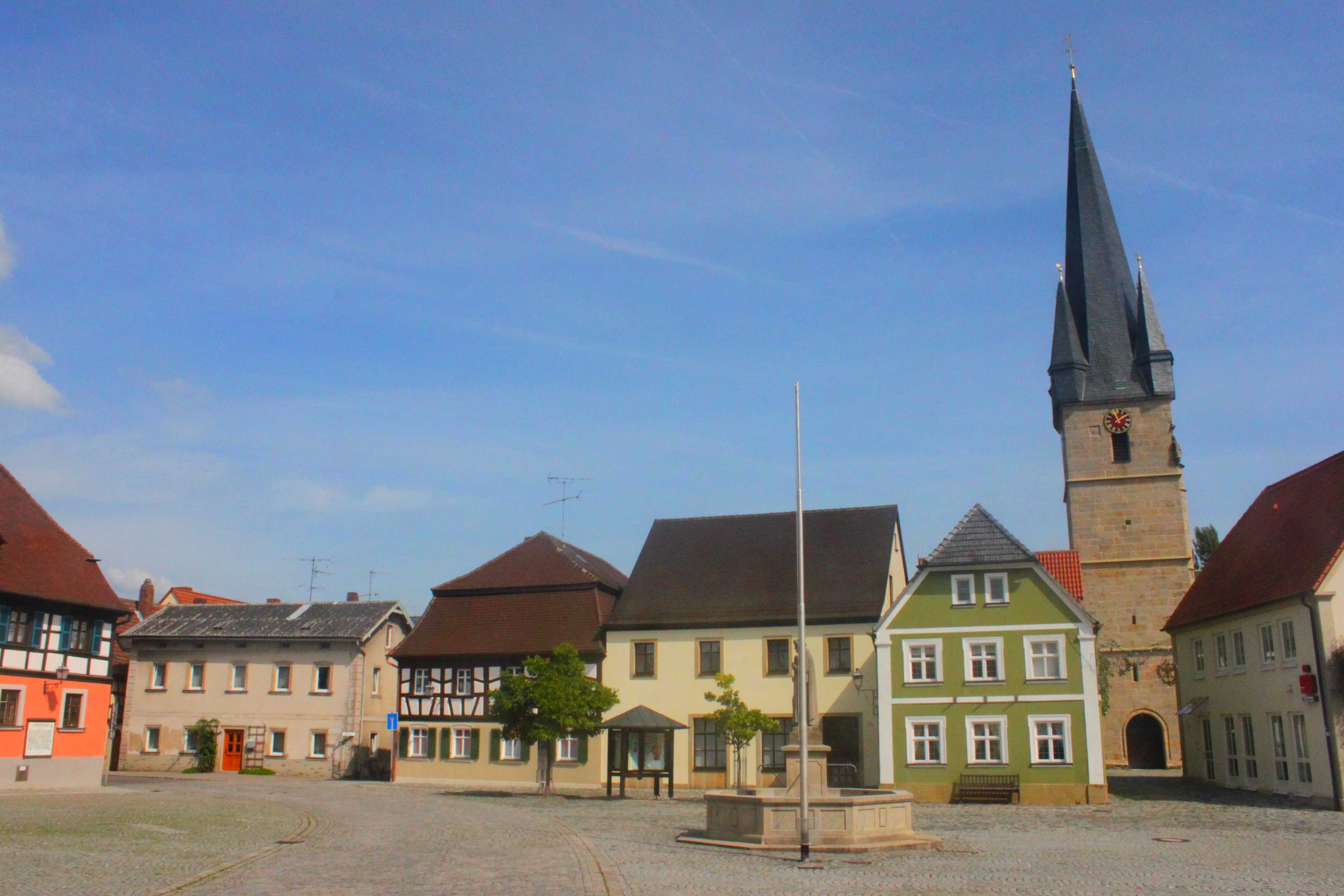 Der Marktplatz in Baunach